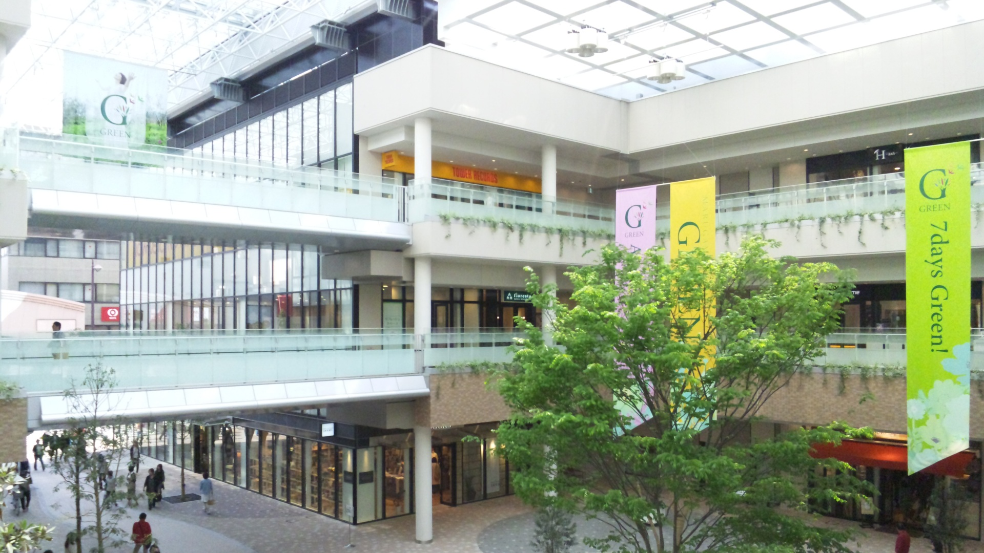 香川県高松市丸亀町にある商業施設「丸亀町グリーン」。